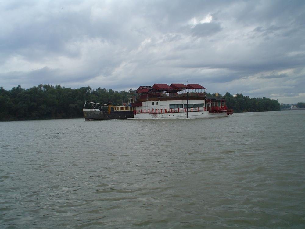 Splav restoran na rijeci Savi u prolazu kroz Slavonski Brod.